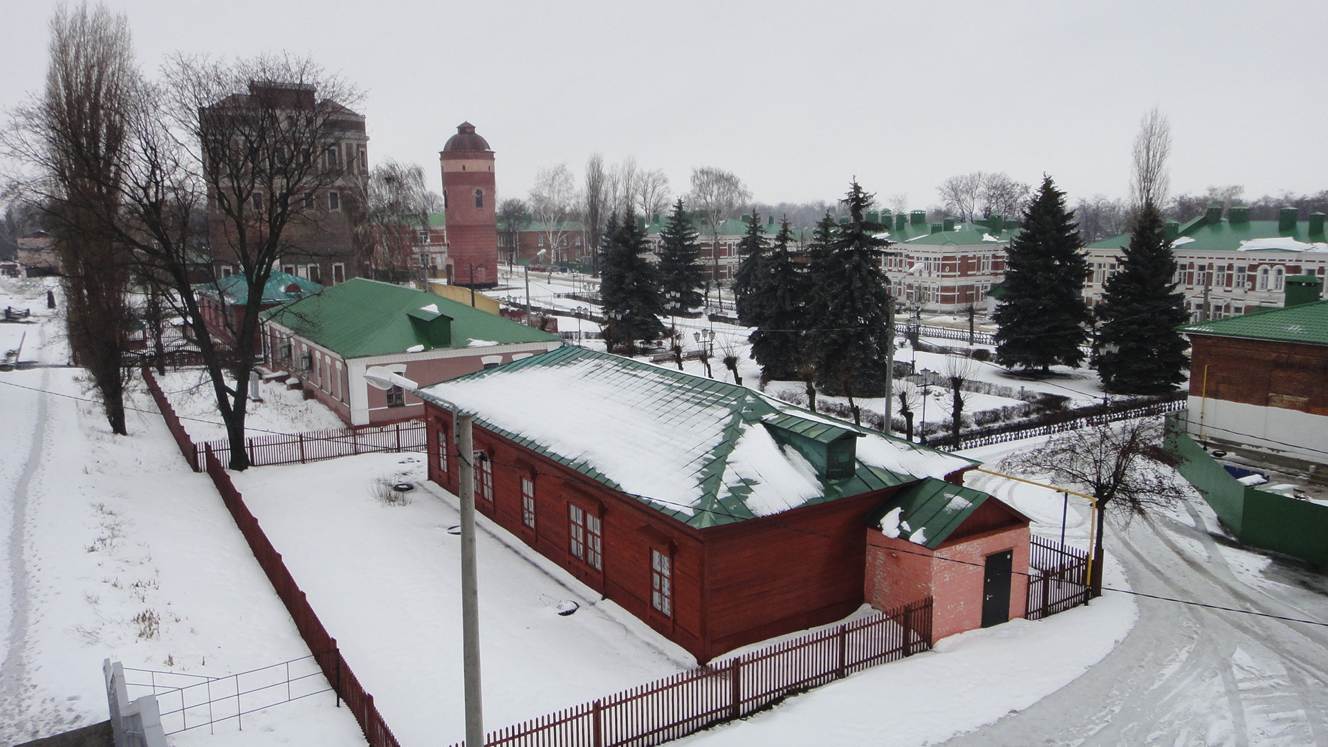 Сквер пристанционный (Липецкая область, Данков, посёлок Лев-Толстой)